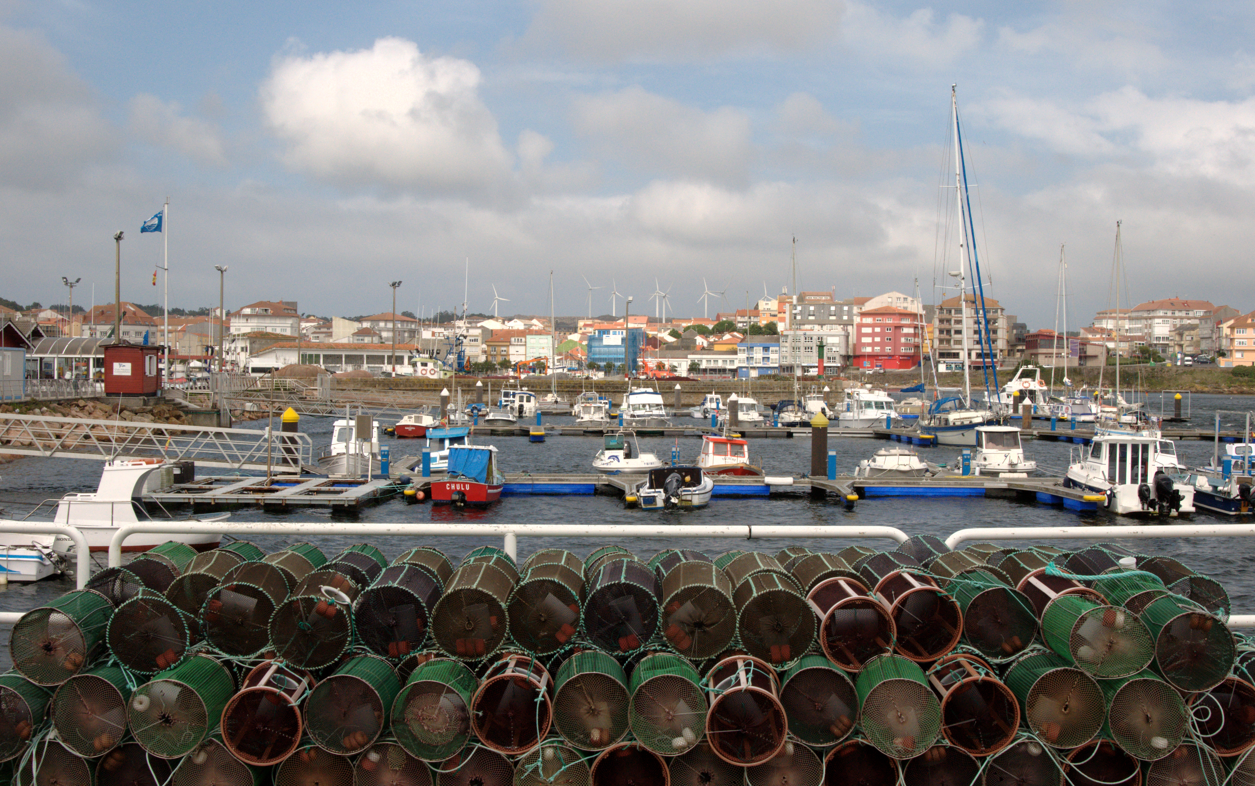 Puerto de Camariñas, Galicia, viejo arpón para cazar ballenas